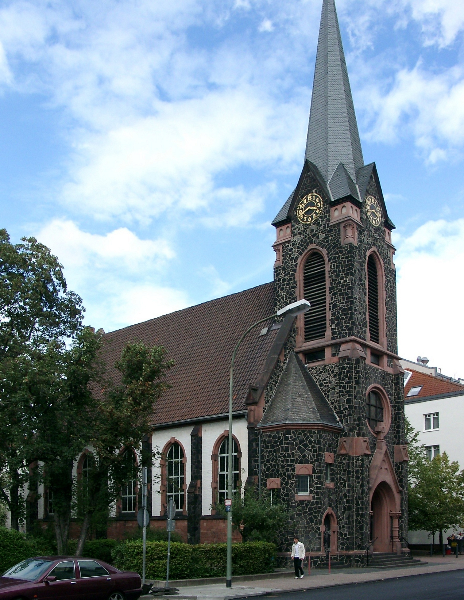 Offenbach am Main, Alt-Katholische Pfarrkirche